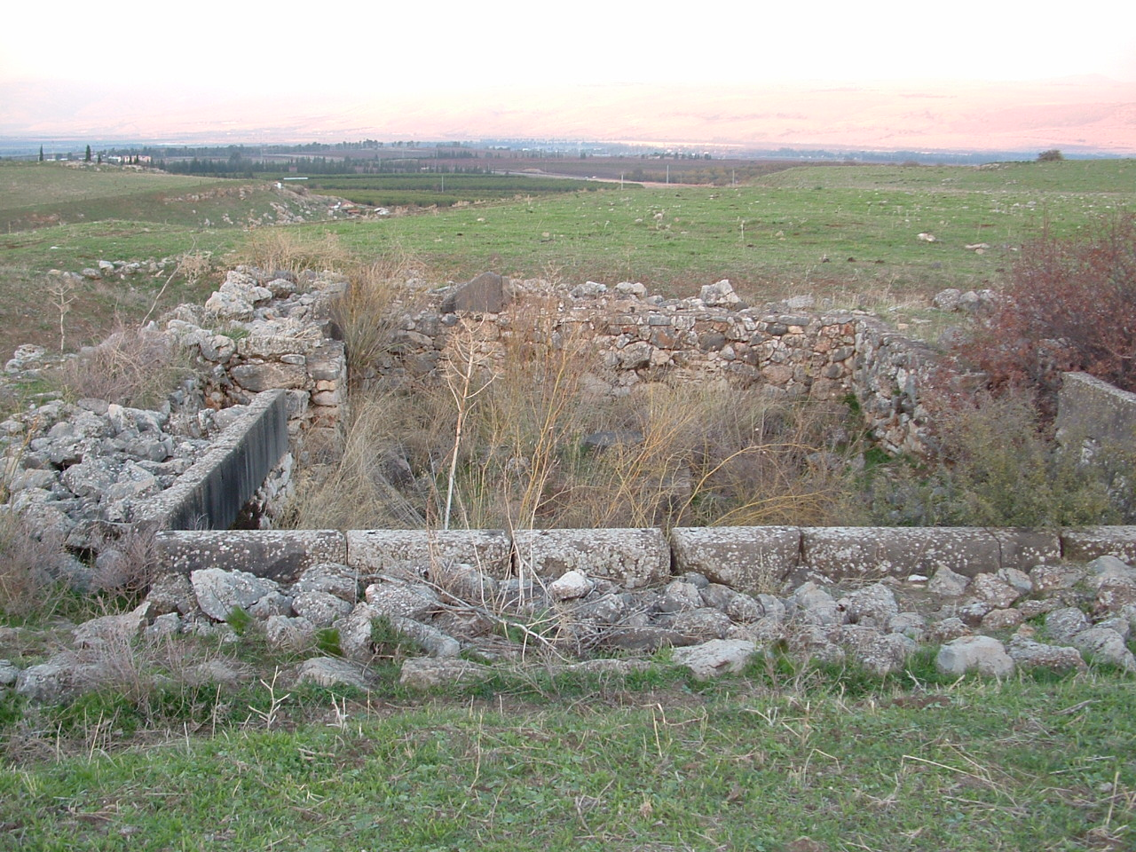 Tel Hazor whose archaeological remains are the largest and richest known in modern Israel. Hazor was an ancient city located in the Upper Galilee תל חצור הוא תל וגן לאומי השוכן בתל אל-קדח סמוך וממערב לאיילת השחר בגבולו הדרומי של עמק החולה. תל חצור משתרע על שטח של כ-820 דונם בין התוואי הישן והחדש של כביש 90 והוא הגדול מבין כ-200 תילים מקראיים ברחבי ישראל.. בשנת 2005 הוכר תל חצור כאתר מורשת עולמית מקדש דביר בשטח ח העיר התחתונה בחצור מתקופת הברונזה המאוחרת